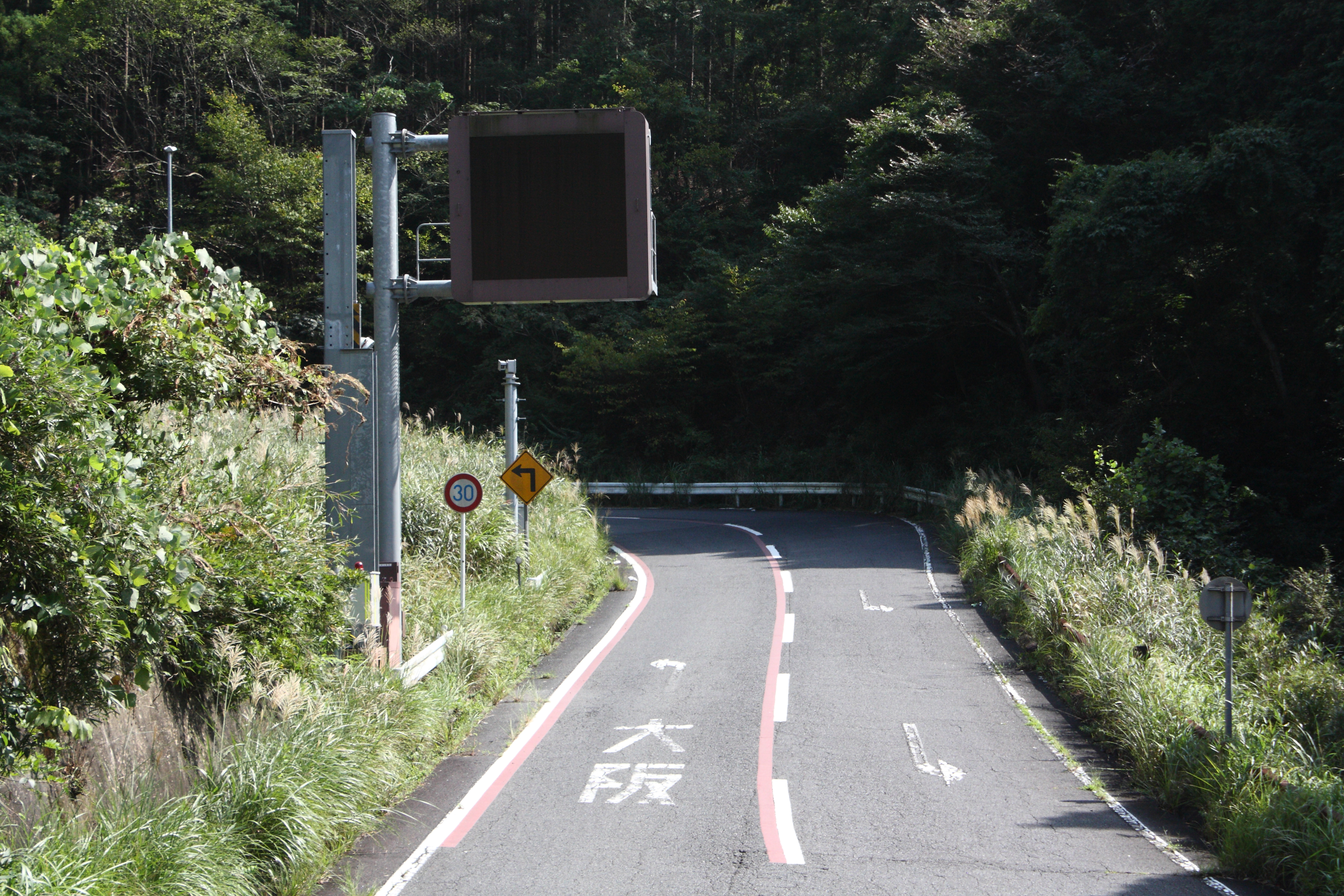 名阪国道 向井インターチェンジ（折畳みダイヤモンド型） 天理方面出入口 三重県亀山市加太向井